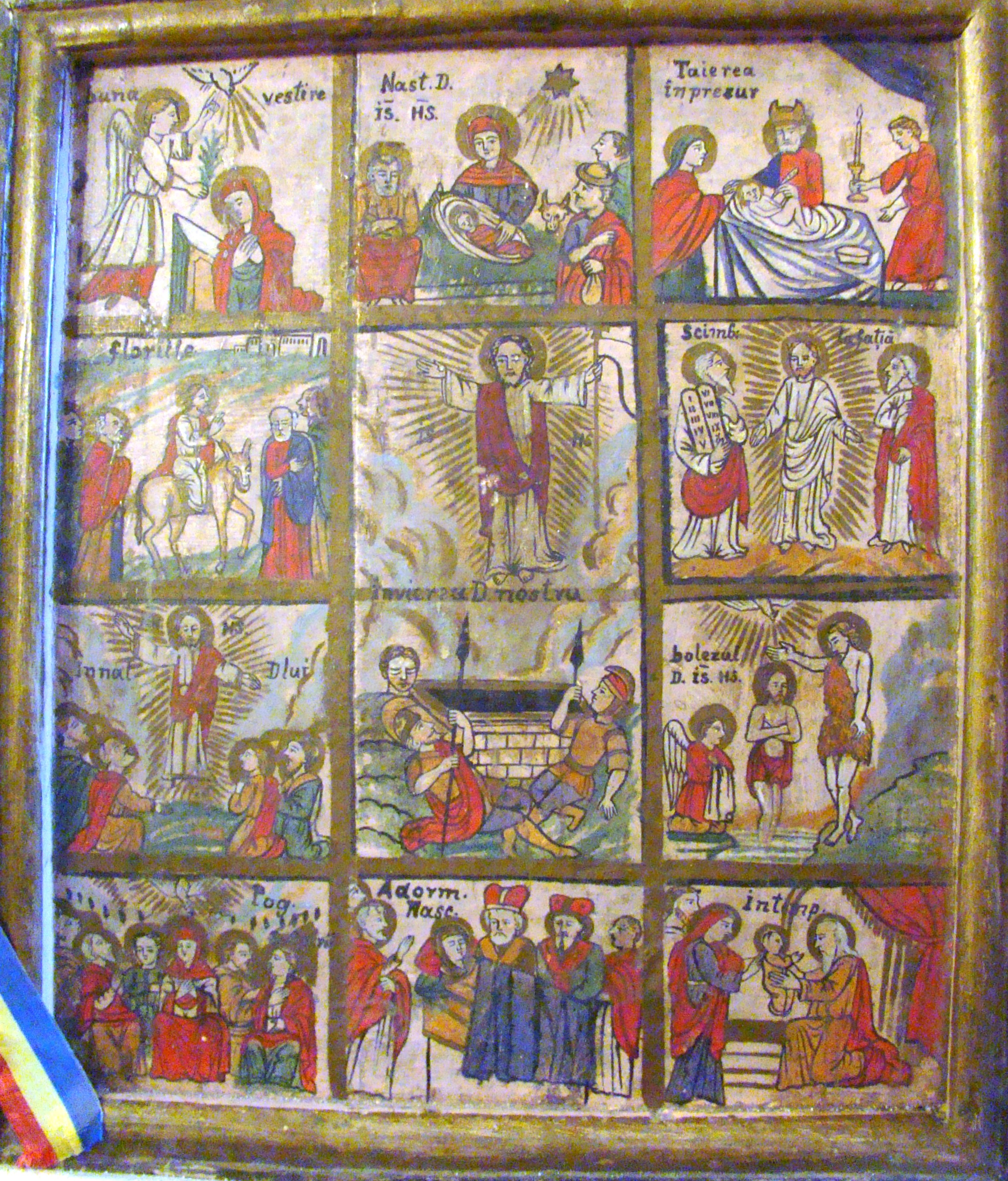 Biserica de lemn „Sfinții împărați Constantin și Elena” din Bârlești, județul Alba